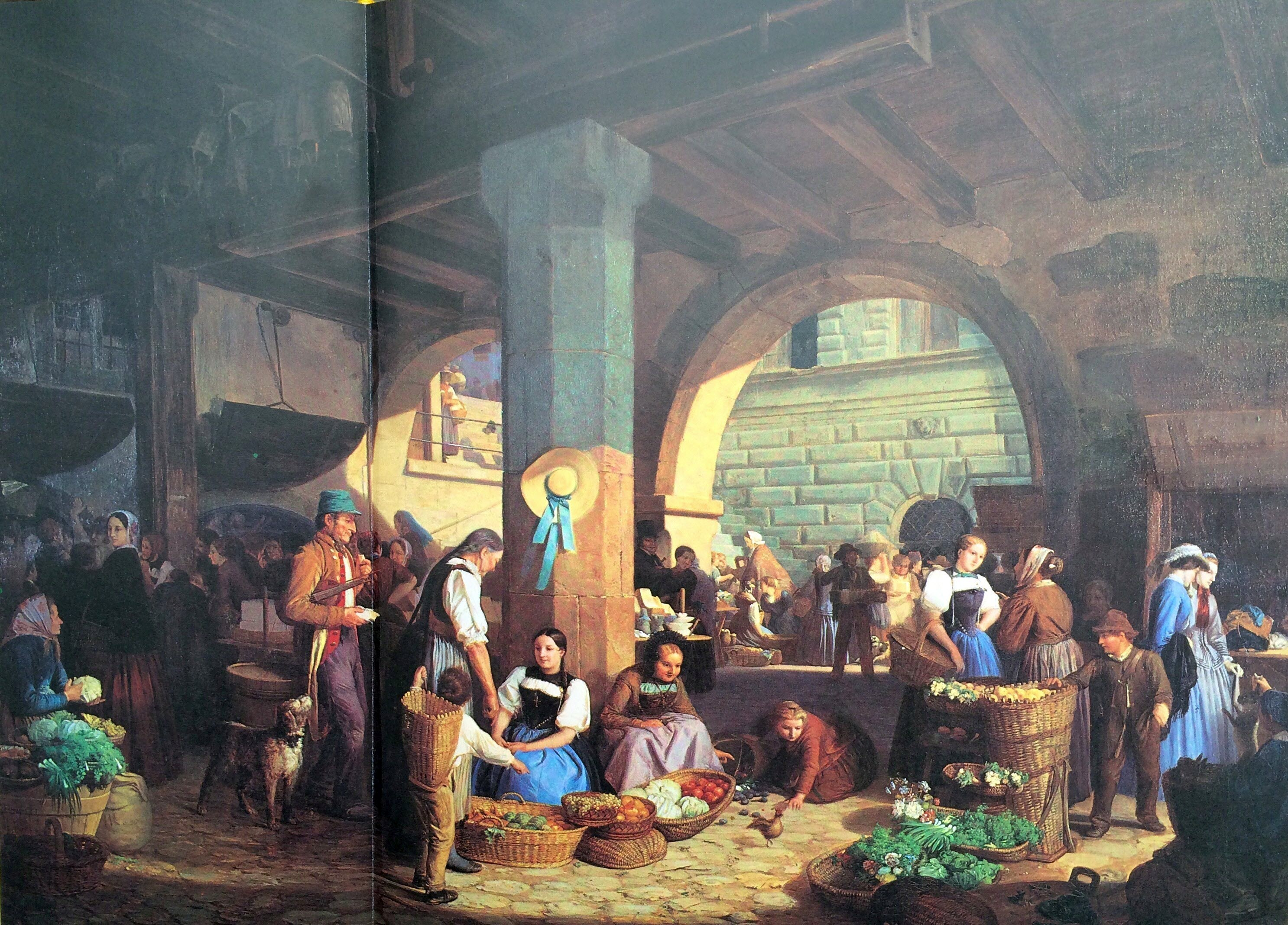 Markt unter der Egg, Xaver Schwegler 1857, Privatbesitz